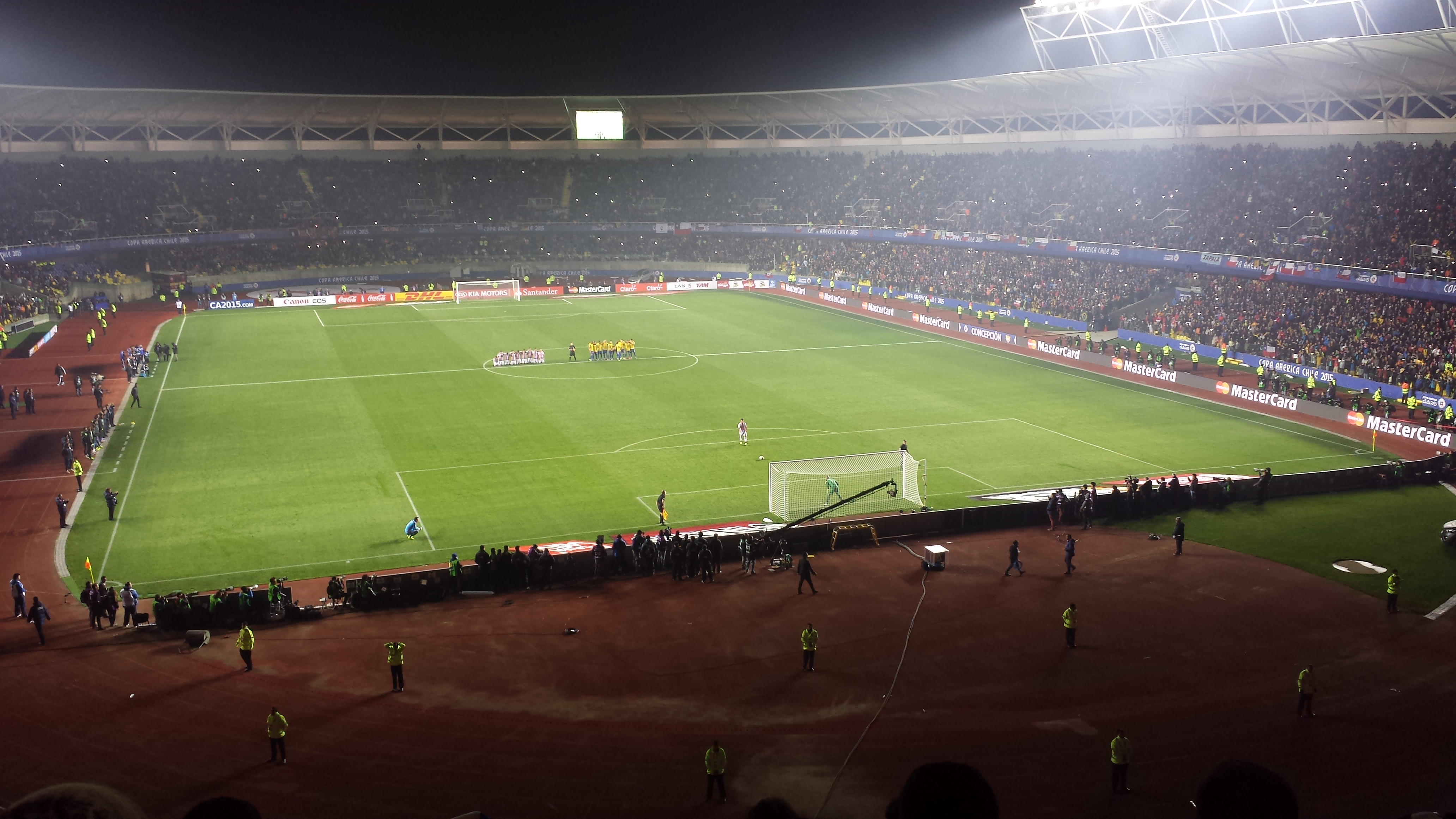 Definición a penales Brasil vs Paraguay por Copa América 2015